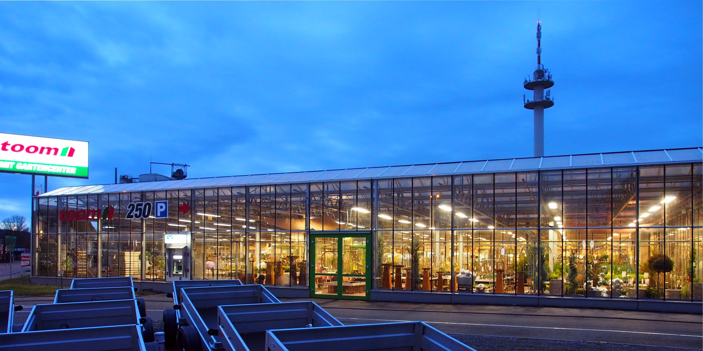 toom Baumarkt in Schorndorf, Glasfassade am Abend